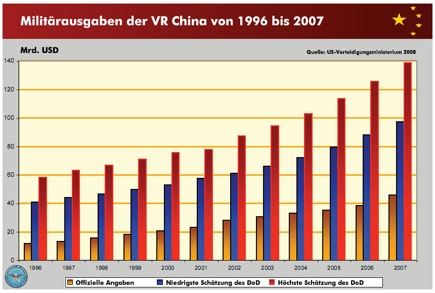 Die chinesischen Militärausgaben von 1996 bis 2007 nach offiziellen Angaben im Vergleich zu Schätzungen des US-Verteidigungsministeriums (Original-Grafik; eingedeutscht)